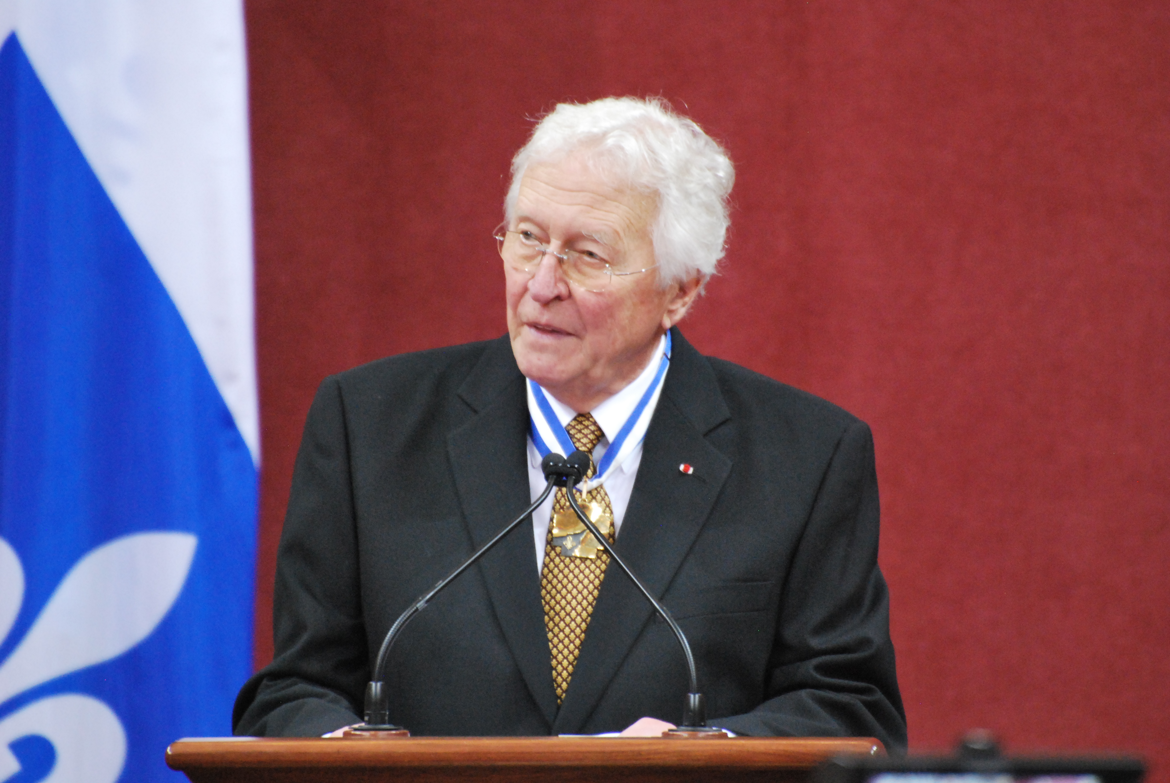 Cérémonie de remise de l'ordre national du Québec 2013. Jean-Paul L'Allier